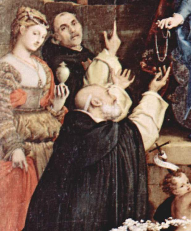 detail